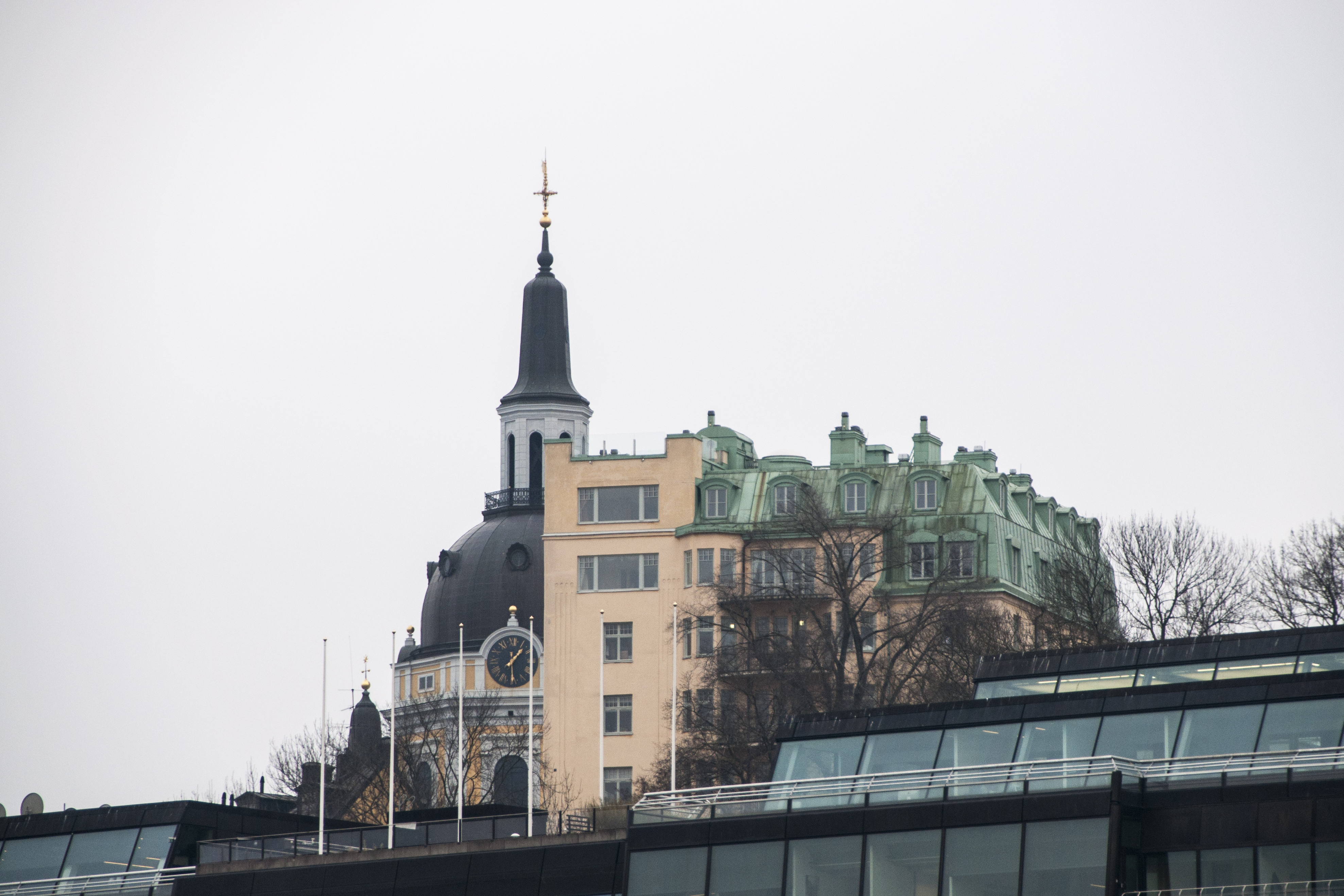 Höga Stigen Större 17, Fiskargatan 9, Svartensgatan 27-29, Uppförd 1907-1908. Arkitekt Knut Peterson, byggherre AB F Perno, byggmästare A Nordström.